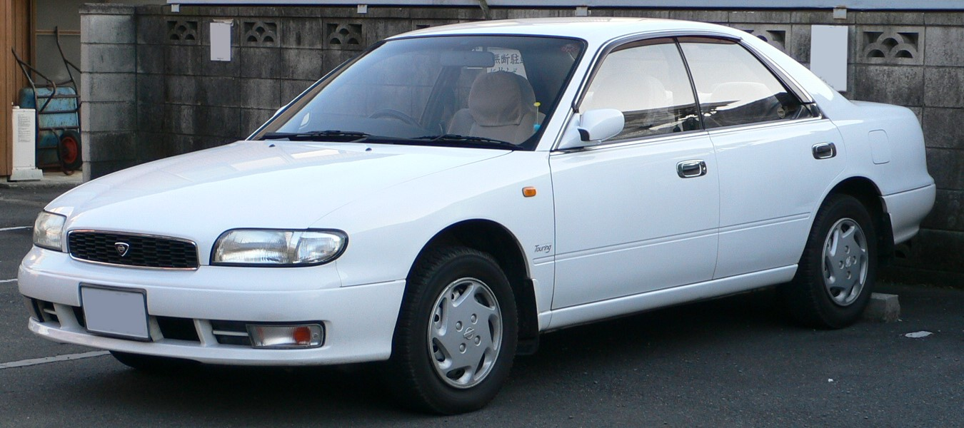 1991 Nissan Bluebird (U13) ARX SSS hardtop sedan (Japan)